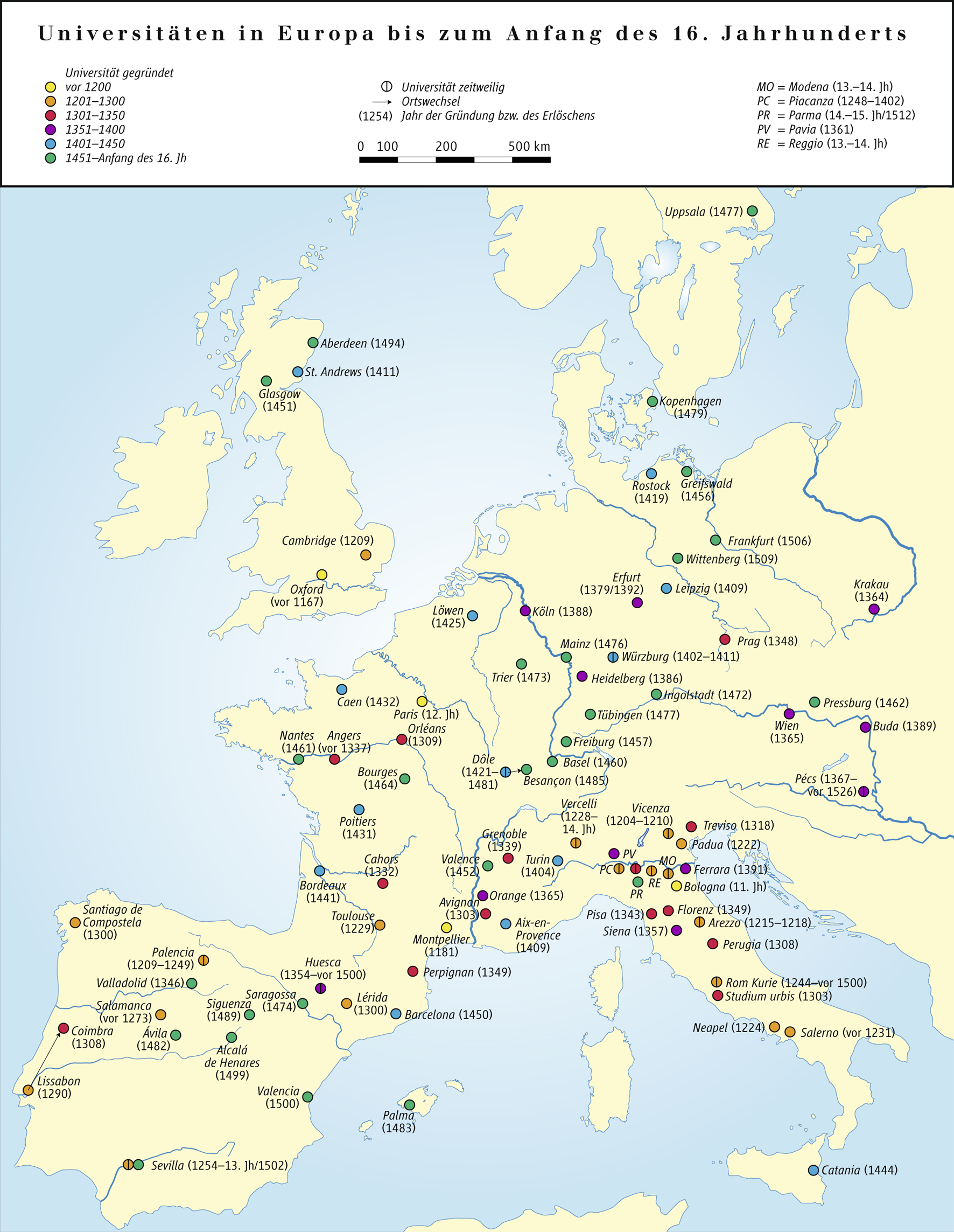 Universitäten in Europa bis zum Anfang des 16. Jhdts.